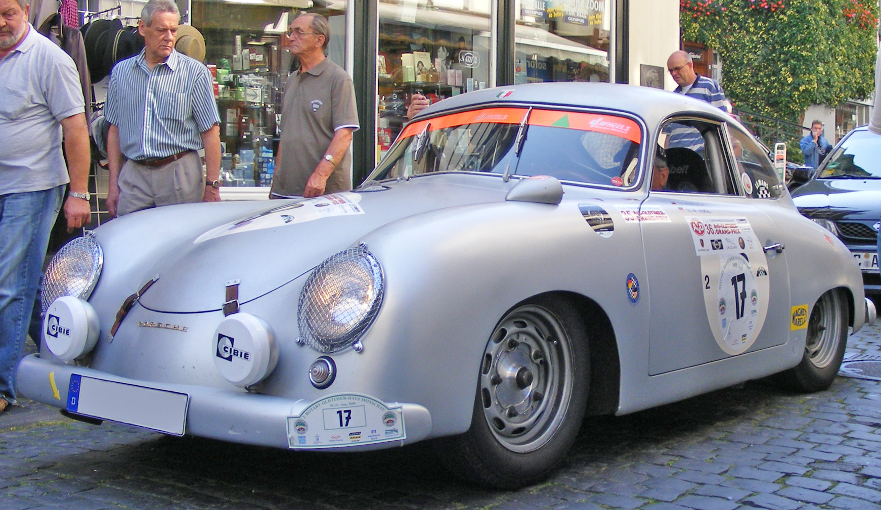 1500 historische Porsche Monschau 2008